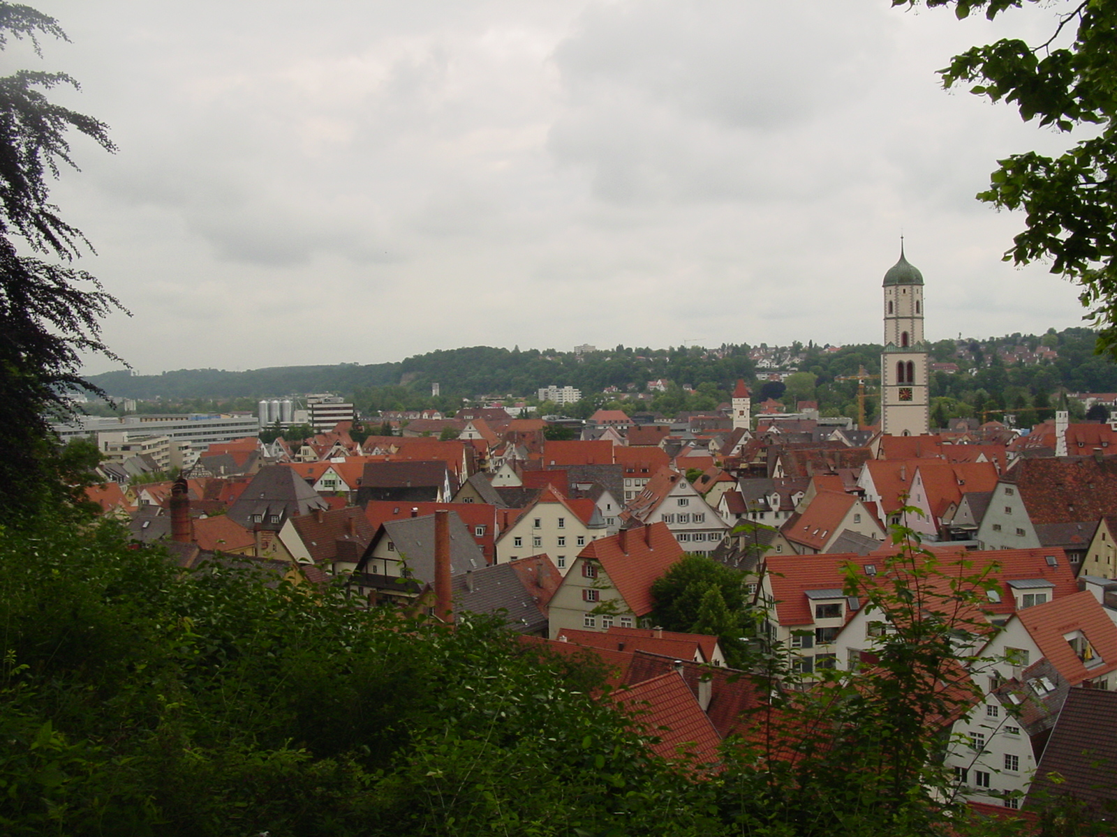 Biberach an der Riß